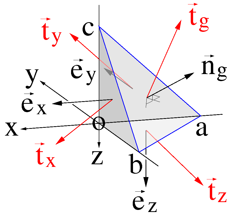 An einem Tetraeder (grau) greifen Schnittspannungsvektoren (rot) an, die im Gleichgewicht sein müssen